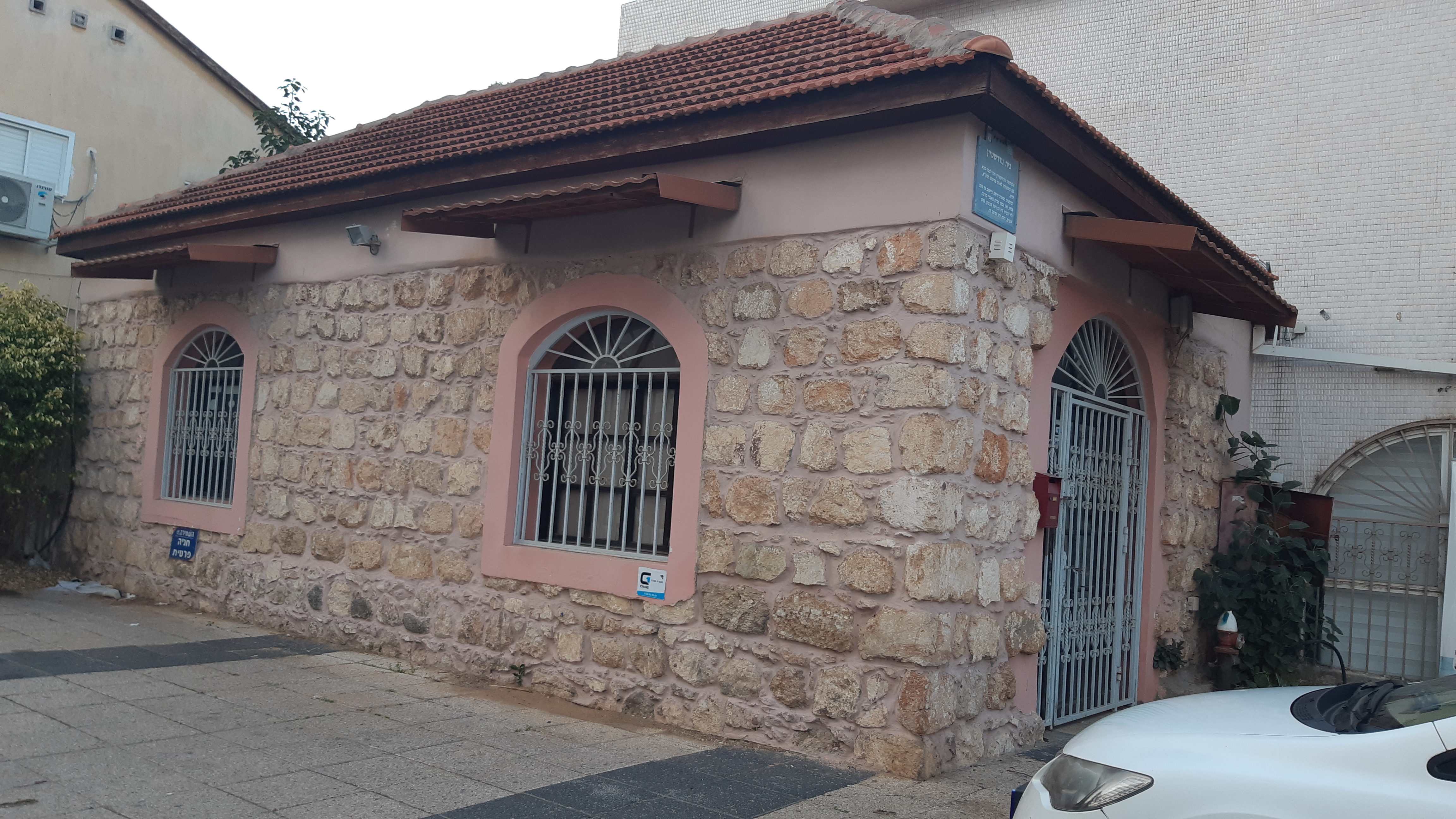 בית נורדשטיין - כפר סבא